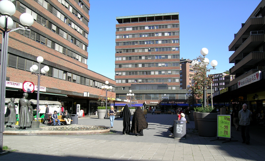 Tøyen Senter, Oslo.